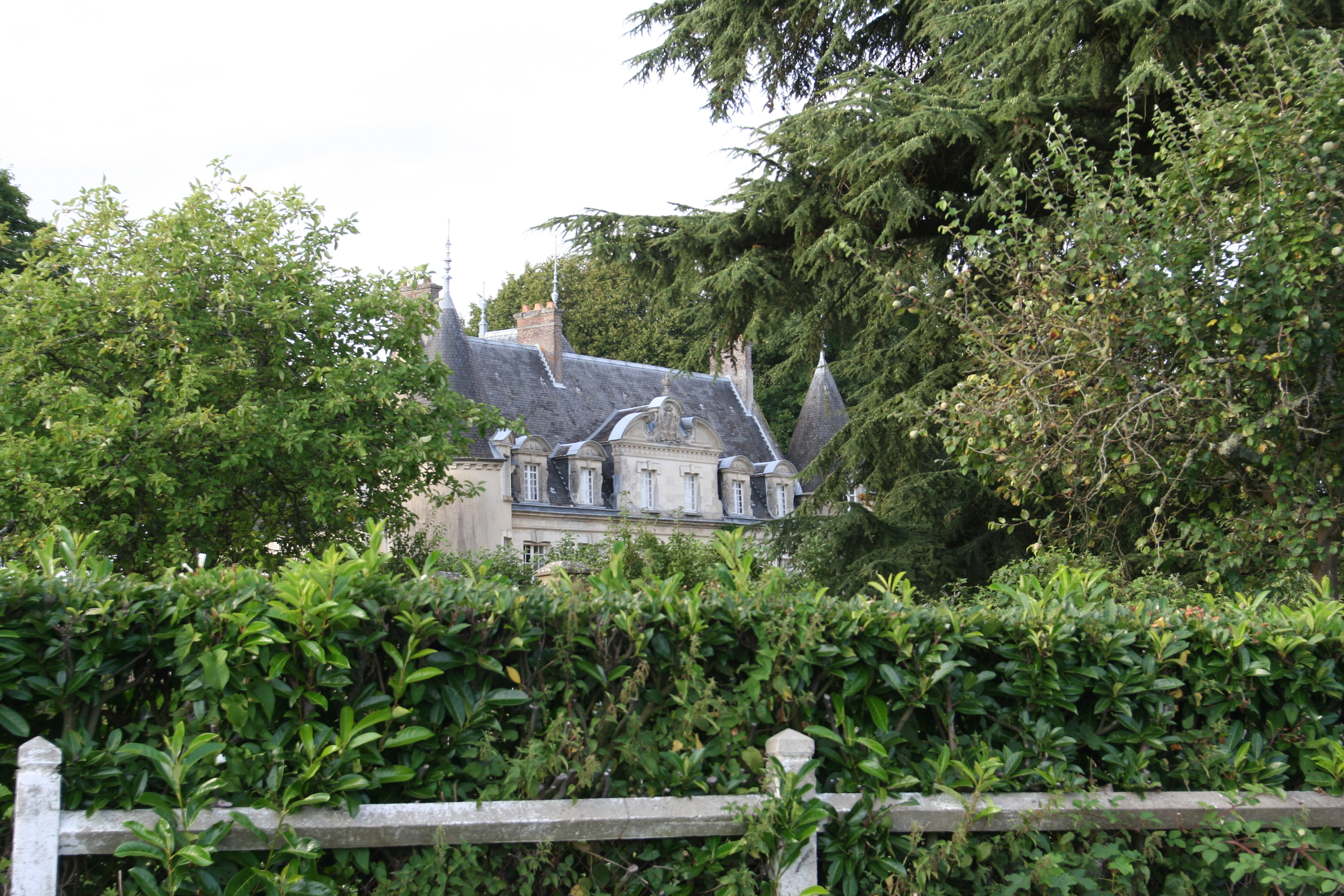 Fronton du château de Saint-Denis-sur-Huisne.